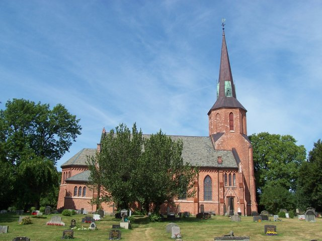 Vestby kirke i Vestby kommune, Akershus, Norway